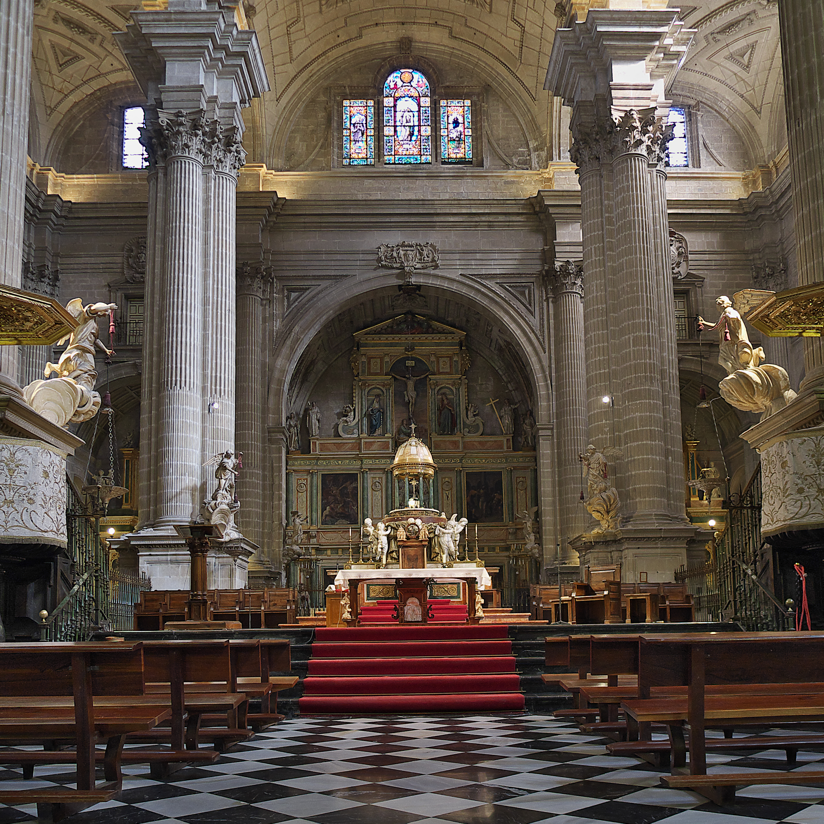 El cardenal y arzobispo Baltasar Moscoso y Sandoval, contrata con Juan de Aranda Salazar la continuación de la fábrica de la Catedral de Jaén (1634)